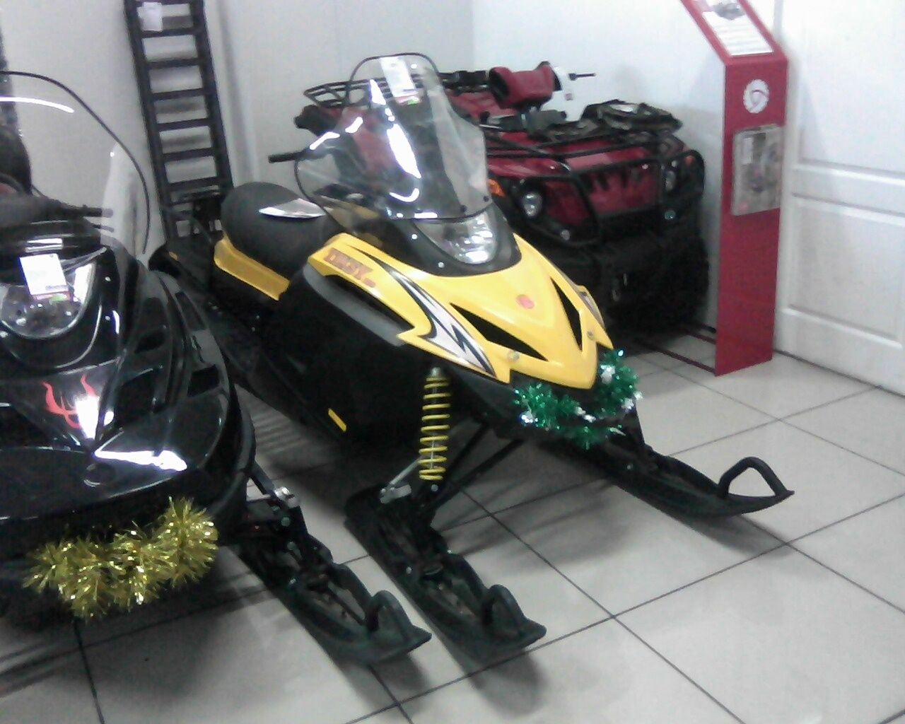 Снегоход Тикси, Россия